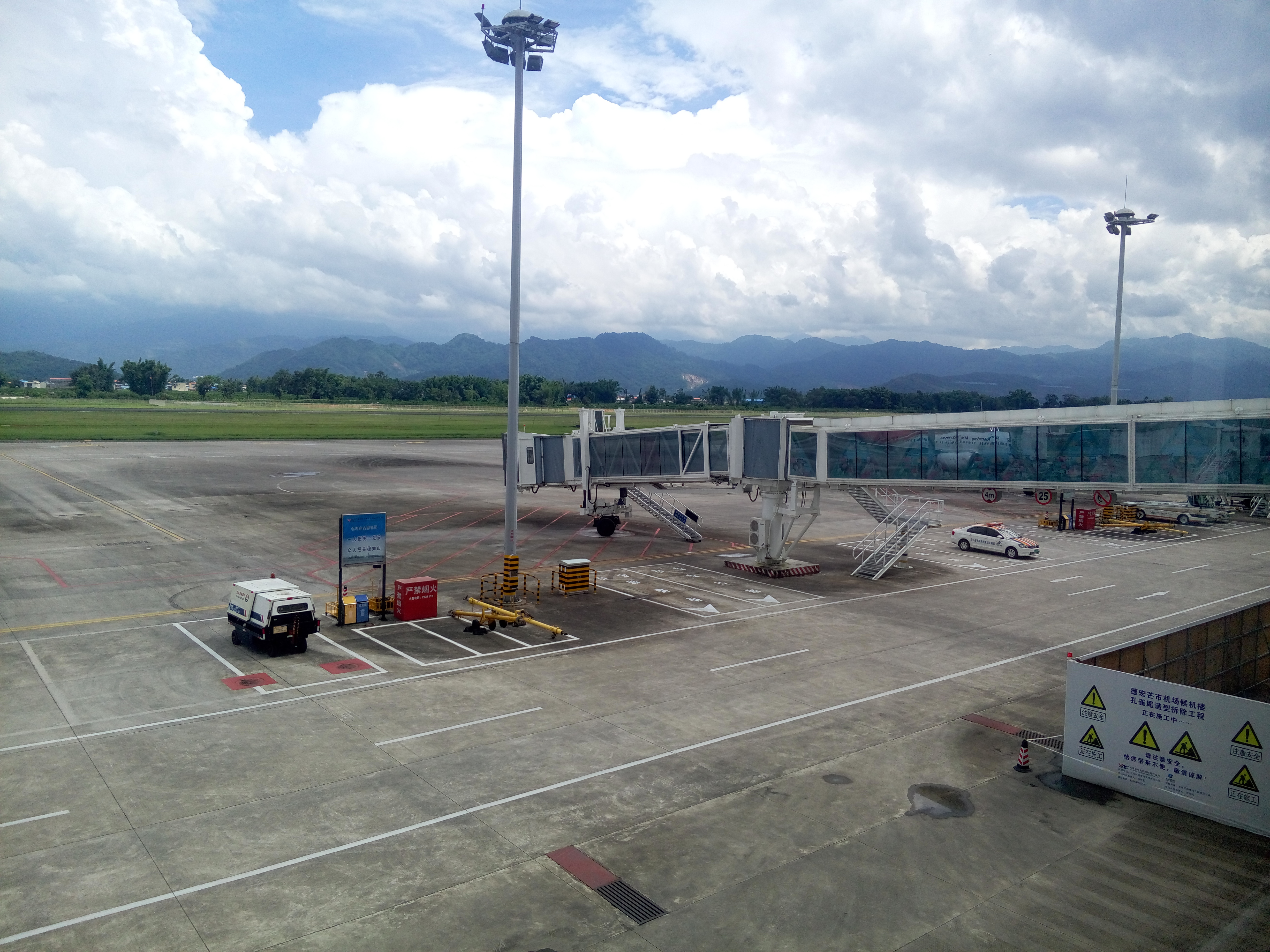 中文（中国大陆）: 德宏芒市机场的登机廊桥